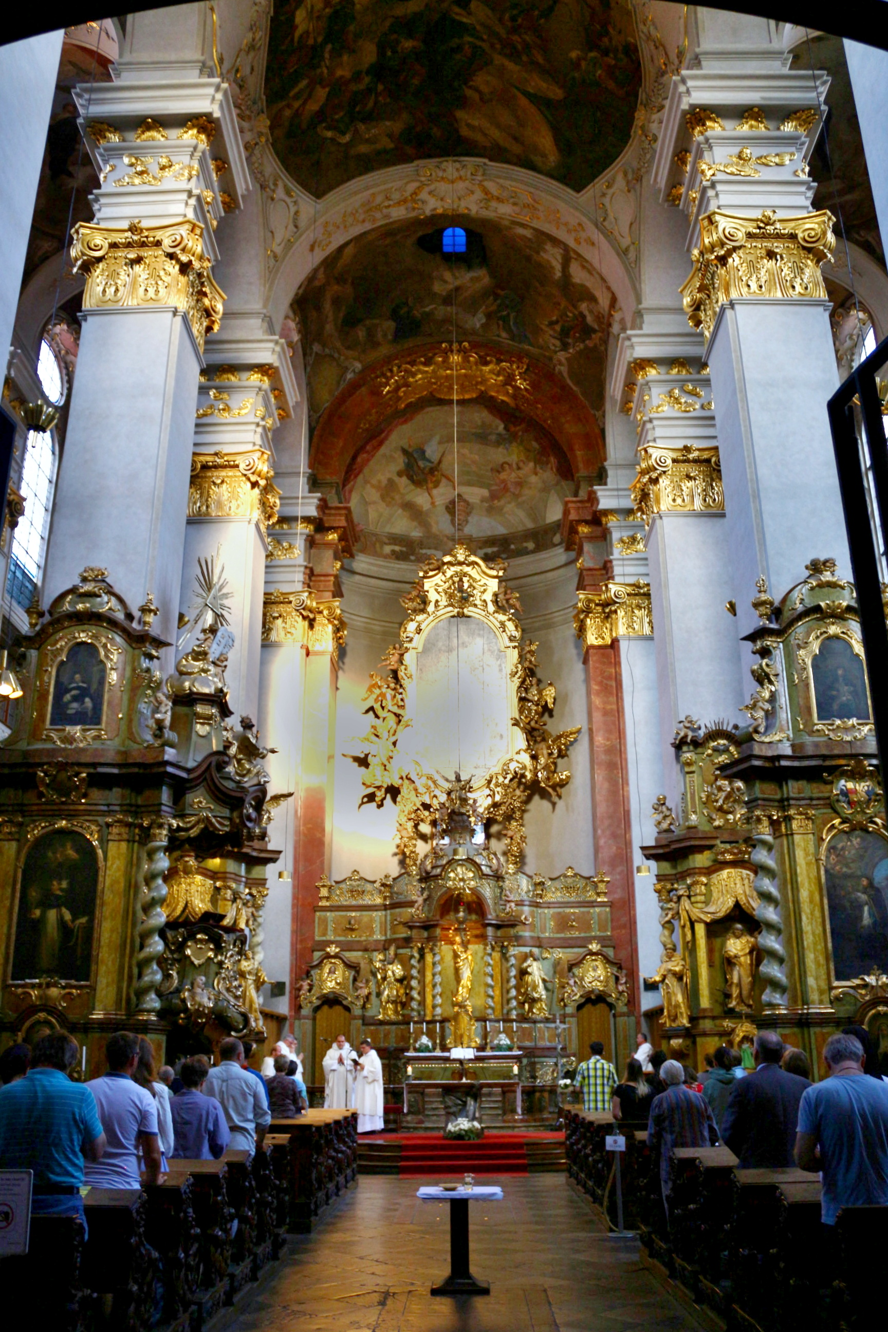 Praha 1-Staré Město, interiér kostela sv. Jiljí